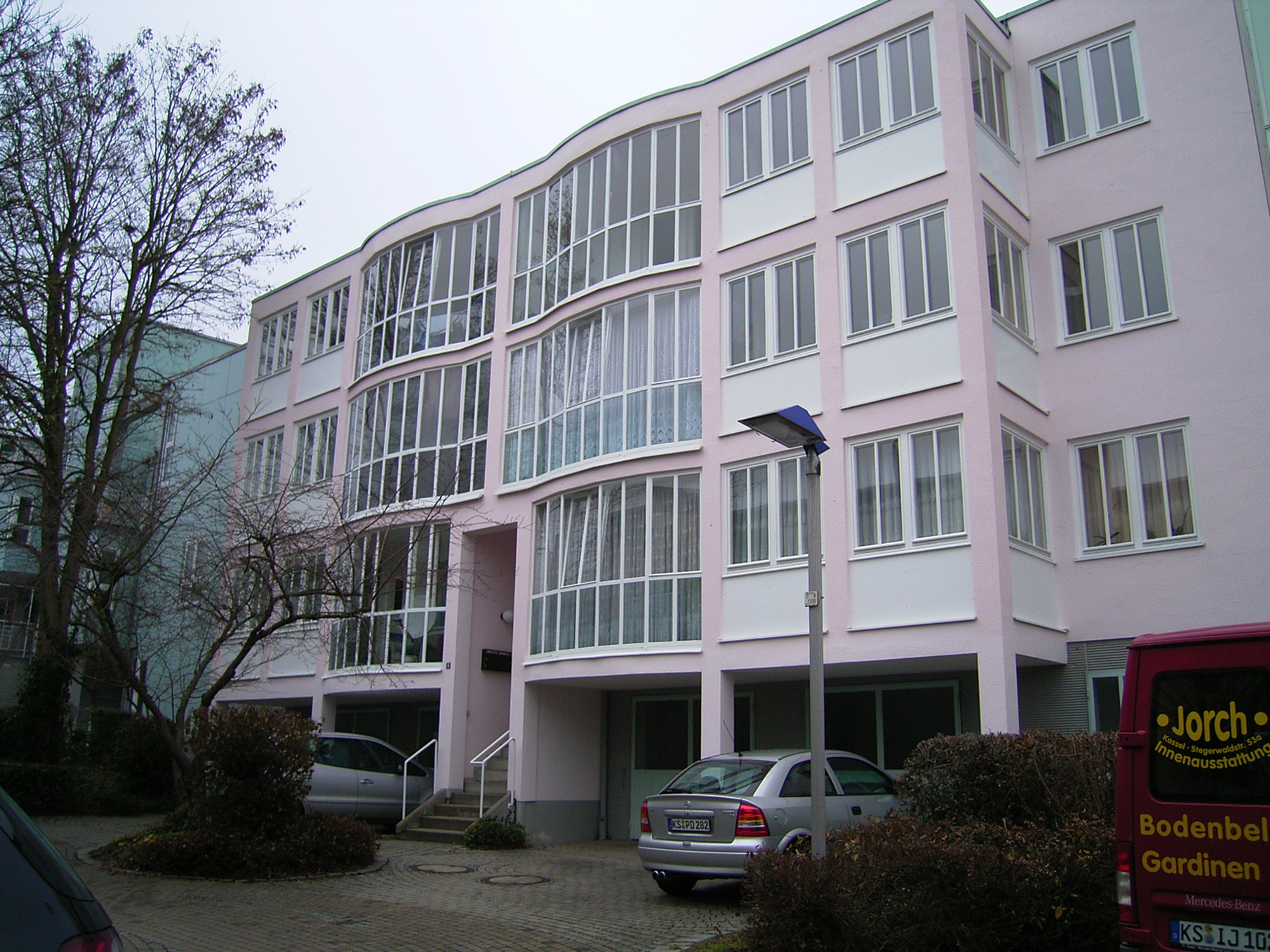 documenta urbana Wohngebäude in Kassel 1979-1982. Teil der „Wohnschlange“, Hilmer und Sattler